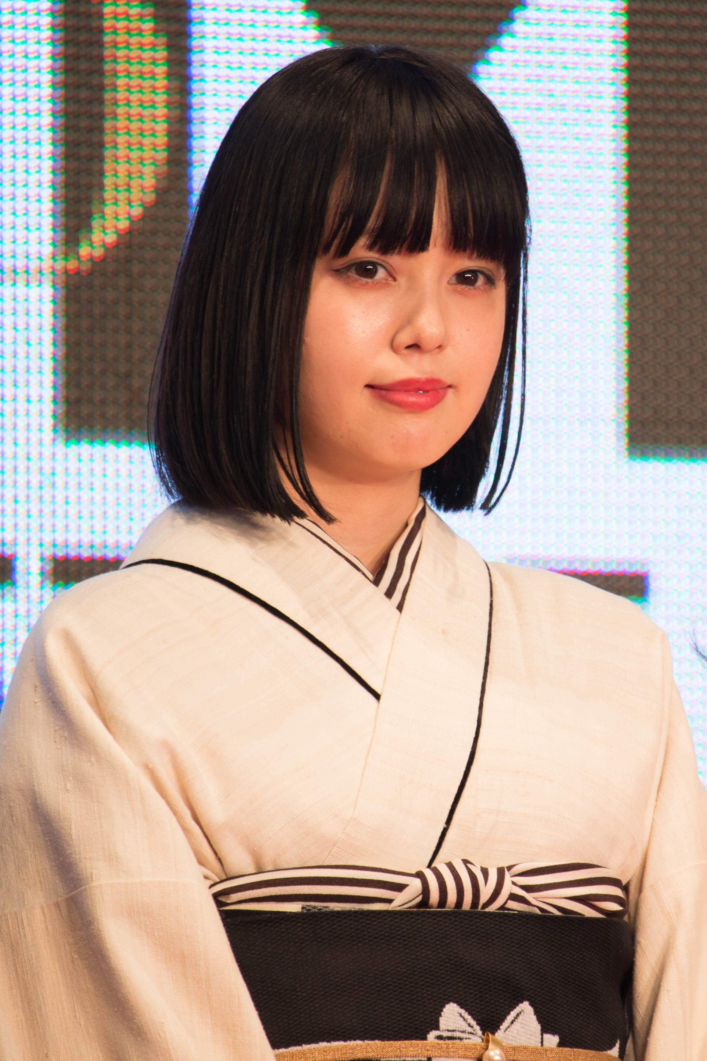 第28回 東京国際映画祭 オープニングセレモニー 青柳文子 (知らない、ふたり)